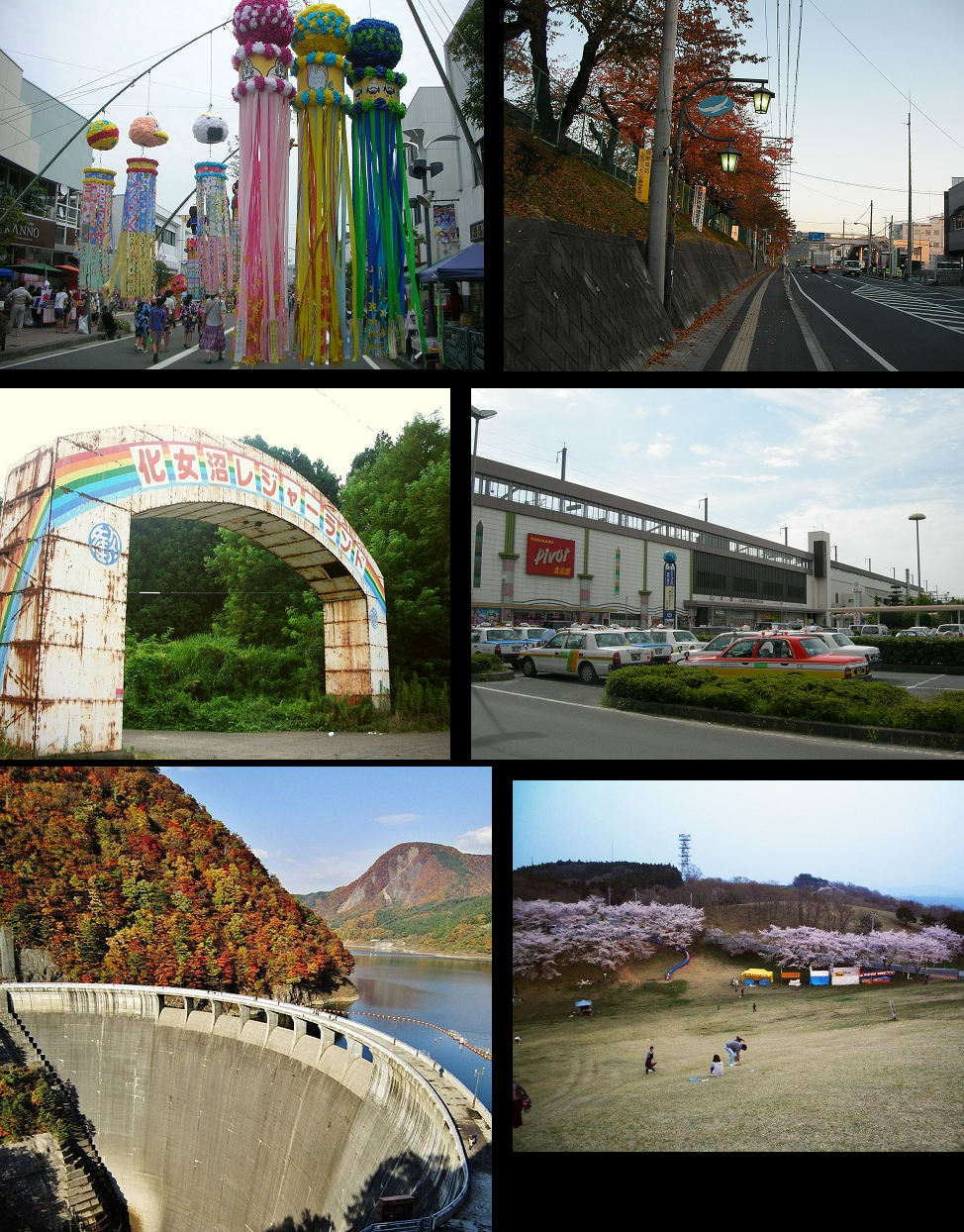 大崎市モンタージュ